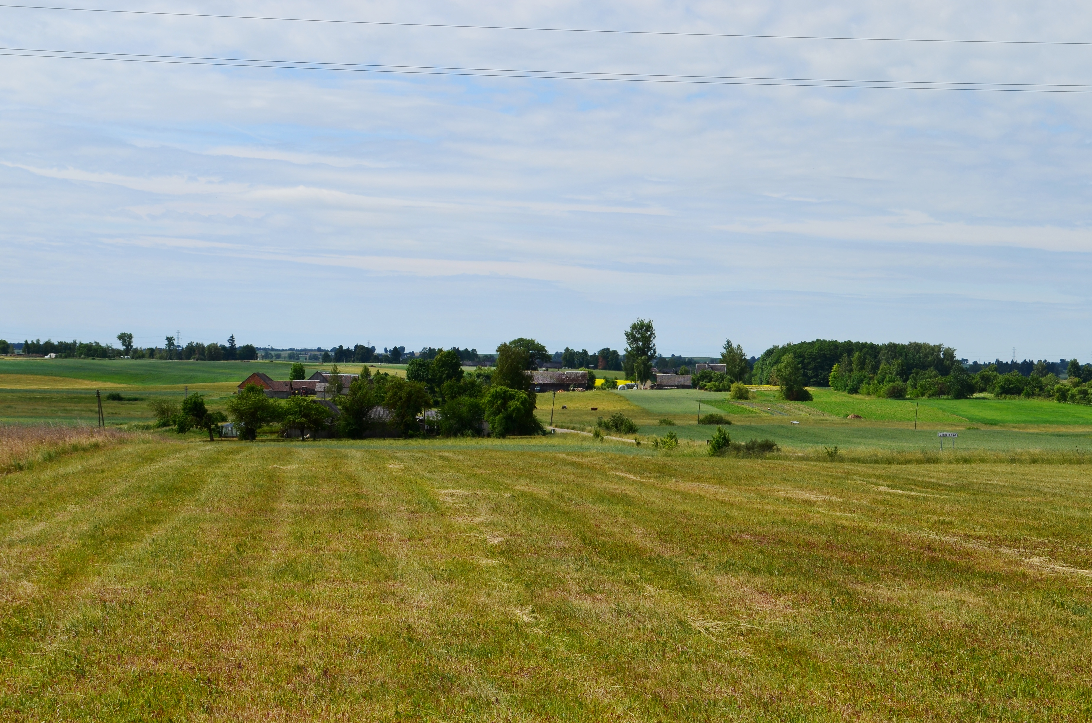 Cibiliekai, Alytaus raj.